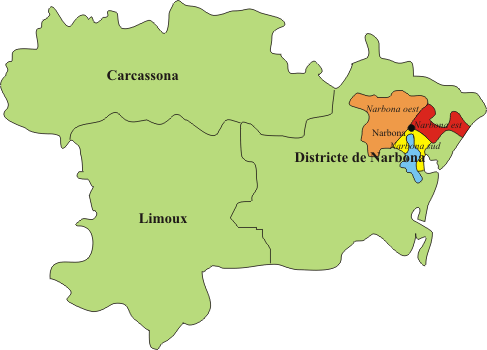 Situació de Narbona al Aude. own work, imatge creació pròpia